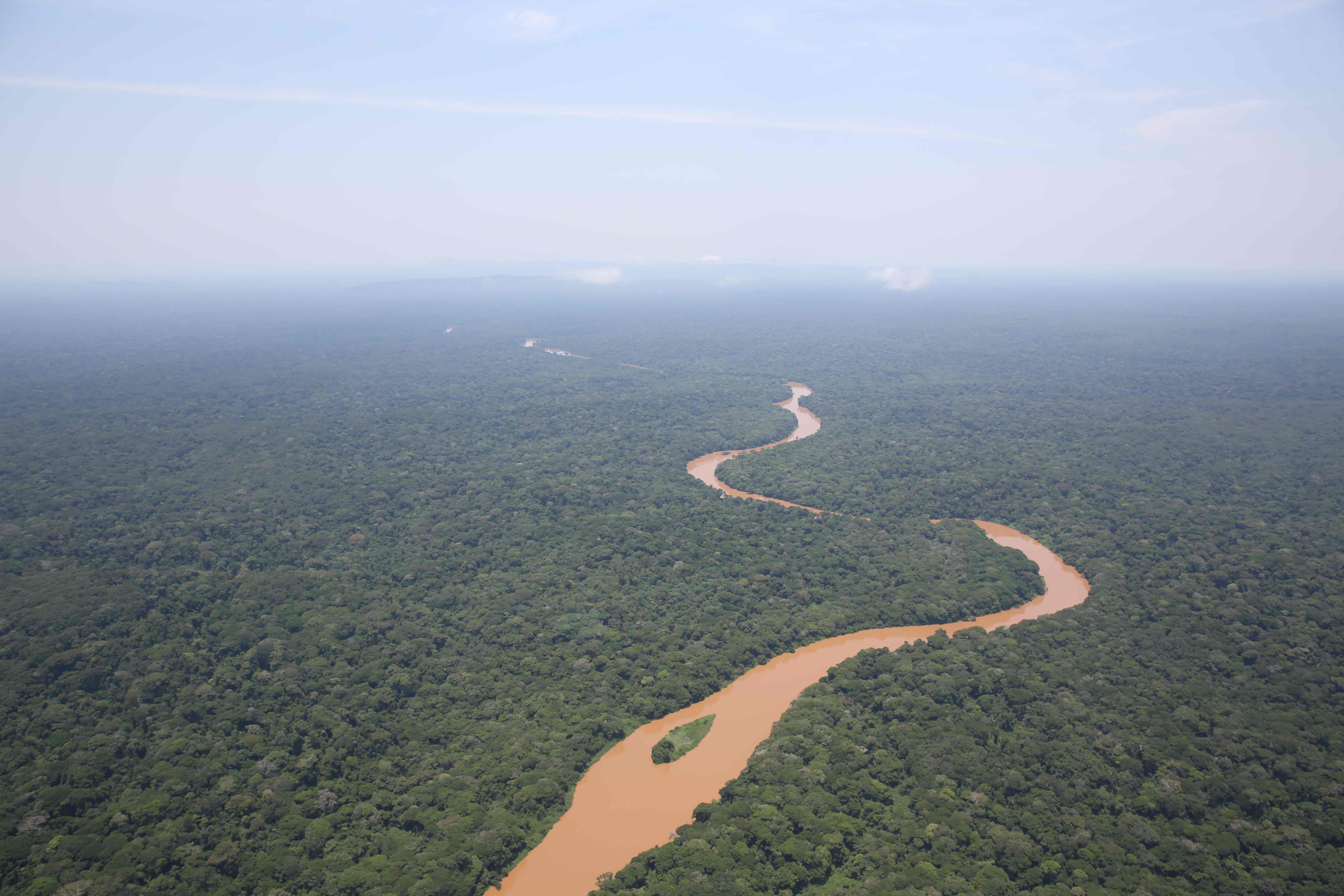 LEGENDE : Province de l'Ituri. RD Congo : Une rivière serpente majestueusement au cœur d'un tapis de jungle préservée proche de la réserve de faune à okapis d’Epulu. Photo MONUSCO/Abel Kavanagh CAPTION : Ituri province, RD Congo: A river majestically winds its way through the depths of a preserved jungle near the okapi wildlife reserve at Epulu. Photo MONUSCO/Abel Kavanagh